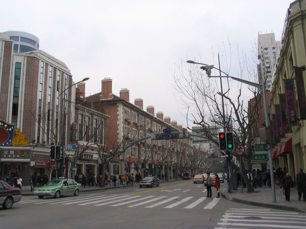 淮海中路-茂名南路-瑞金一路方向 Huaihai Road (M)